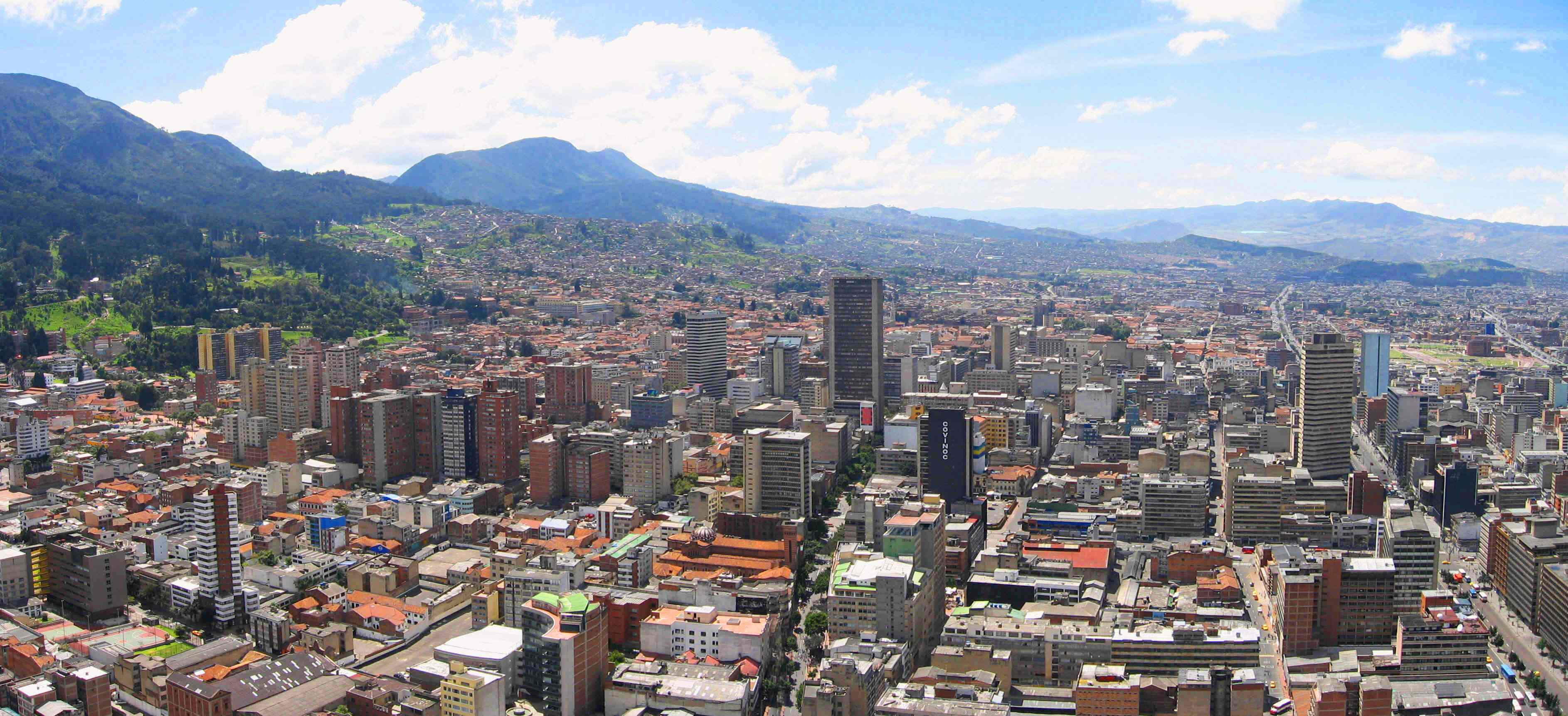 Bogotá, centro tradicional desde torre colpatria